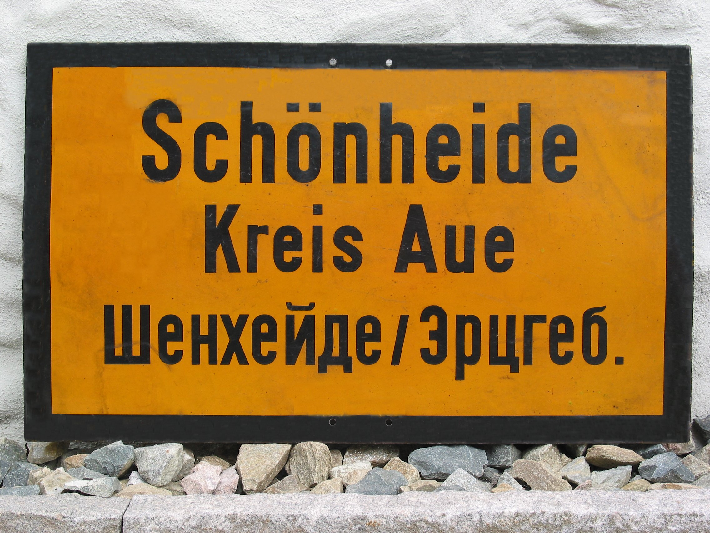 Dieses Ortseingangsschild wurde nach Ende des 2. Weltkrieges angebracht. Es musste die Ortsbezeichnung wegen der sowjetischen Besatzung in kyrillischer Schrift angebracht sein. Es ist ein historisches Schild und befindet sich jetzt im Bürsten- und Heimatmuseum Schönheide.